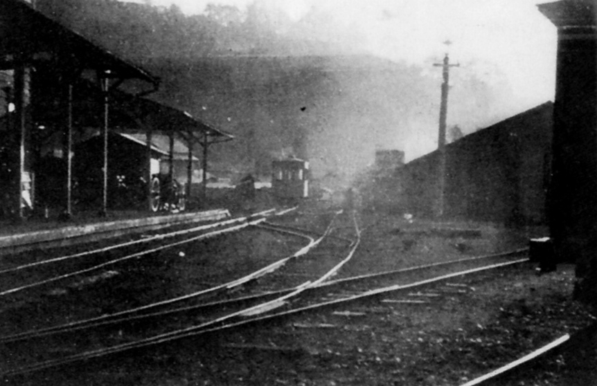 安倍鉄道の起点。朝もやの井宮駅構内。